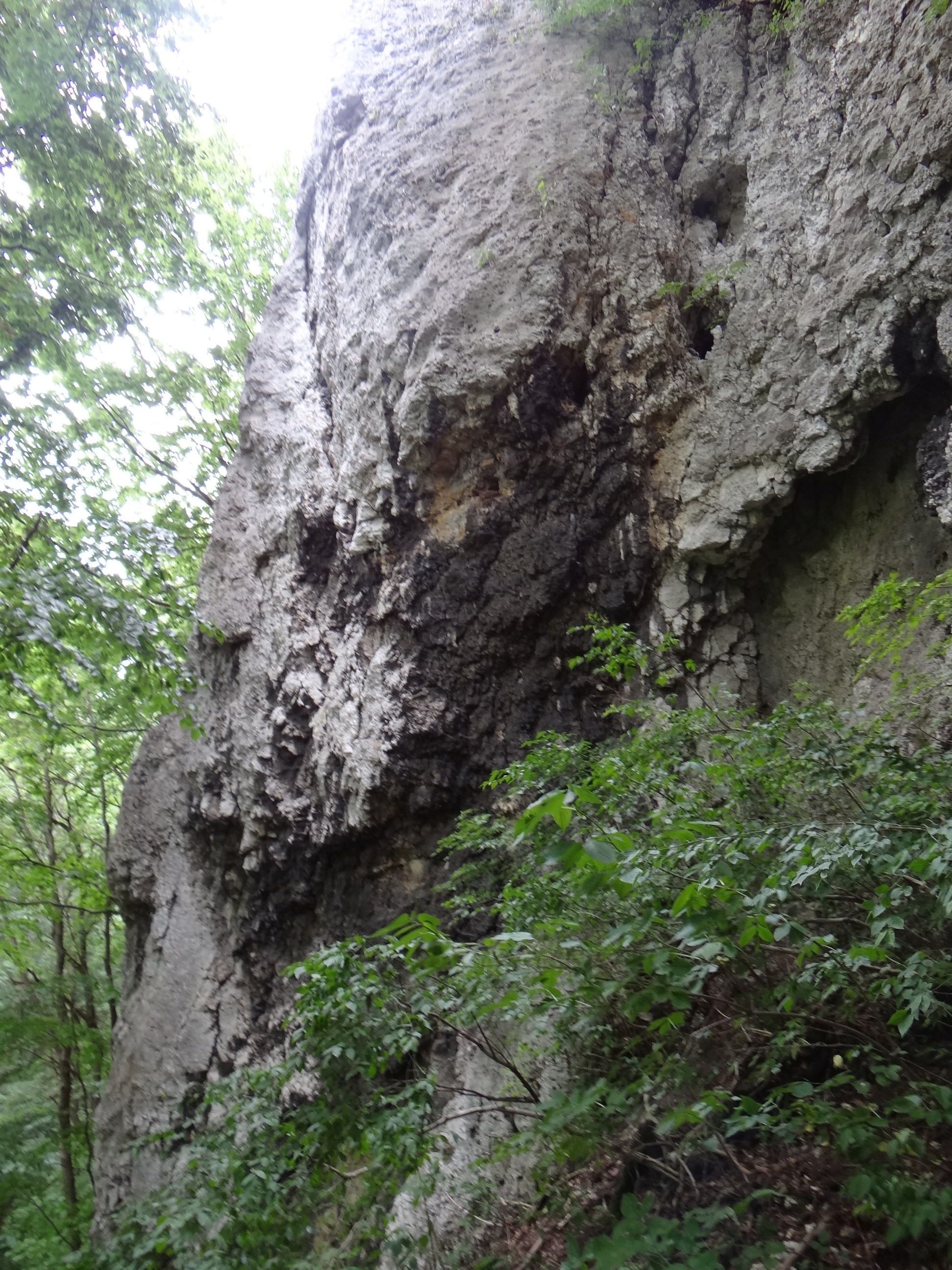 Wielka Ostryszniańska w Wąwozie Ostryszni w Imbramowicach